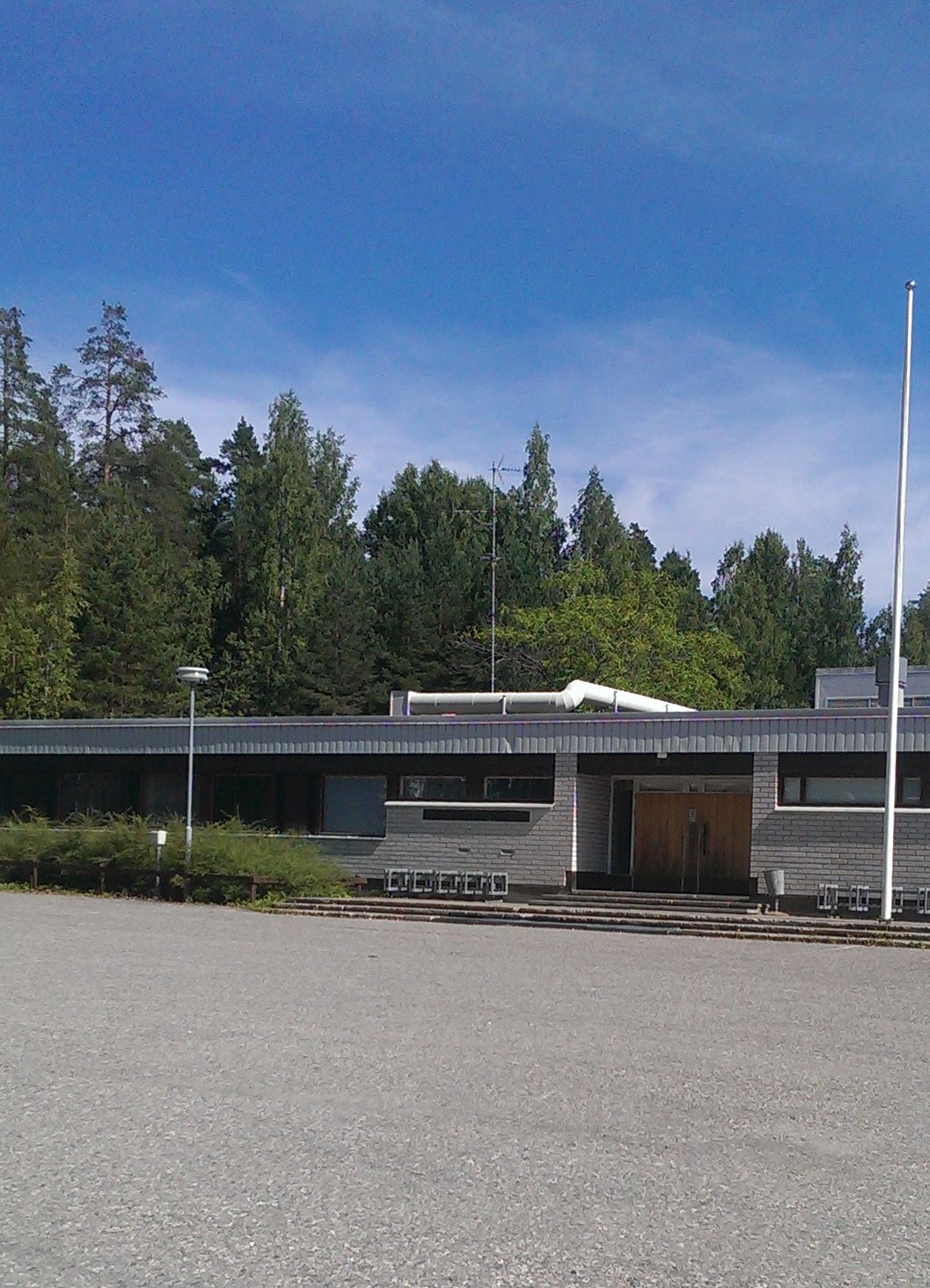 Vehkojankoulu Hyvinkäällä